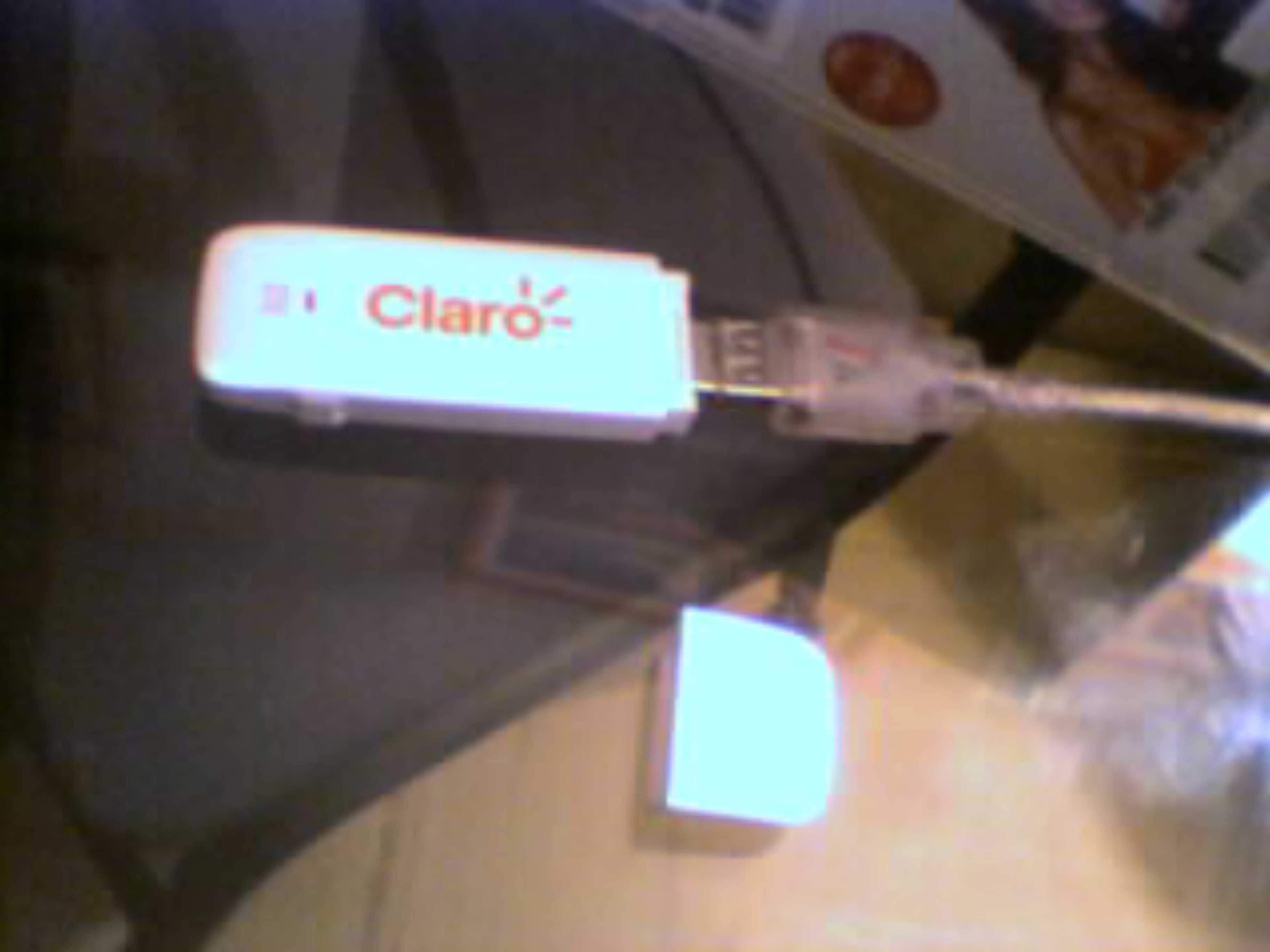 Imagen del módem de claro chile ZTE MF626